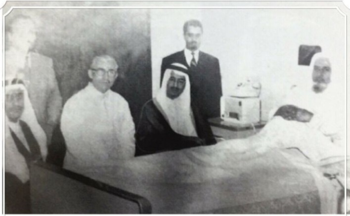 الامير سلمان بن عبدالعزيز يزور الامير محسن الفرم فالمستشفى